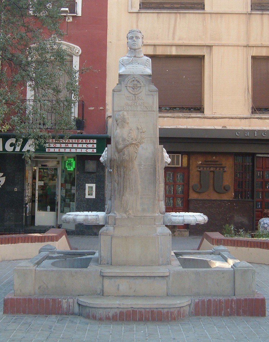 Busto de Hernández Menor en Villena